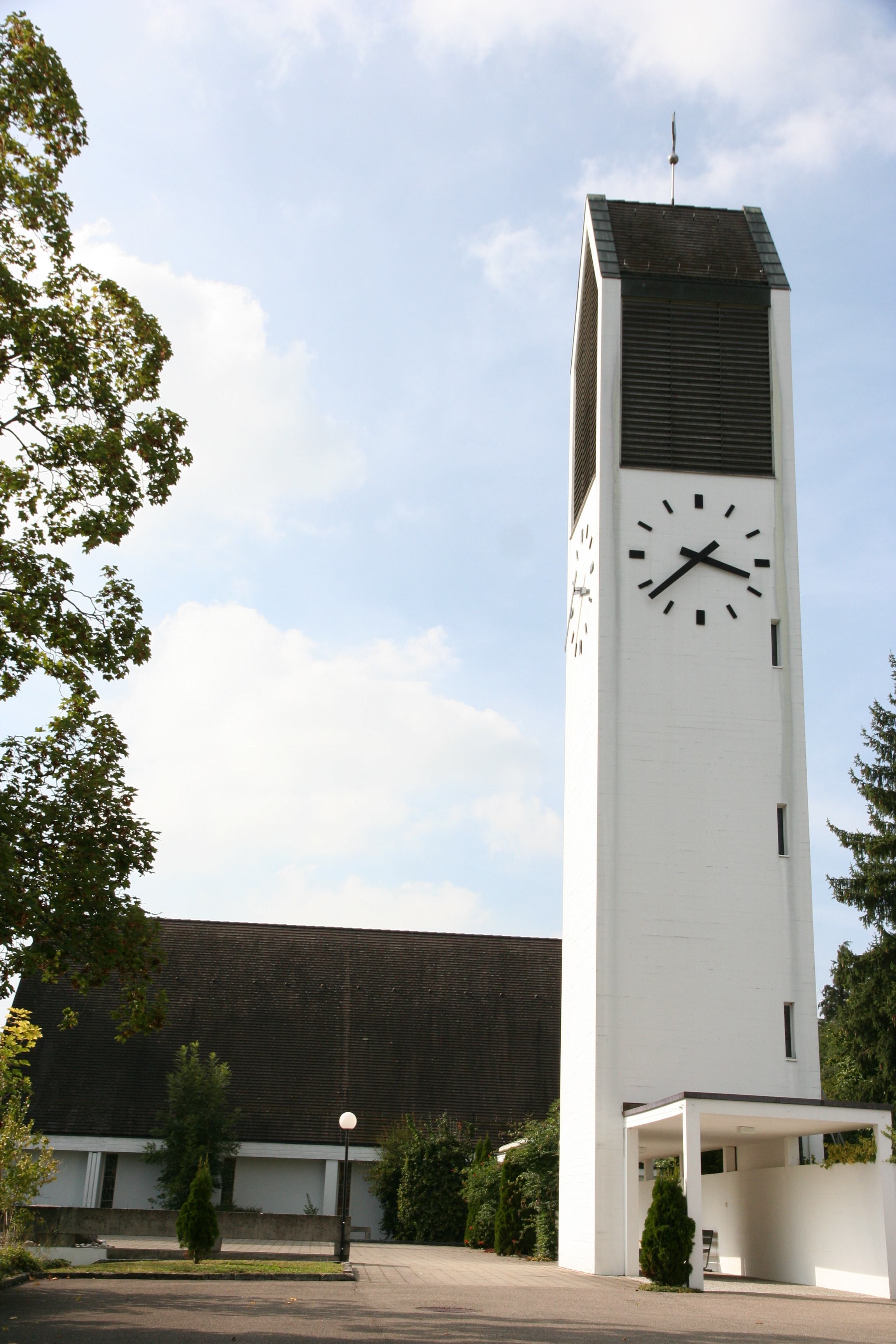 Evangelische Kirche Hüttwilen TG